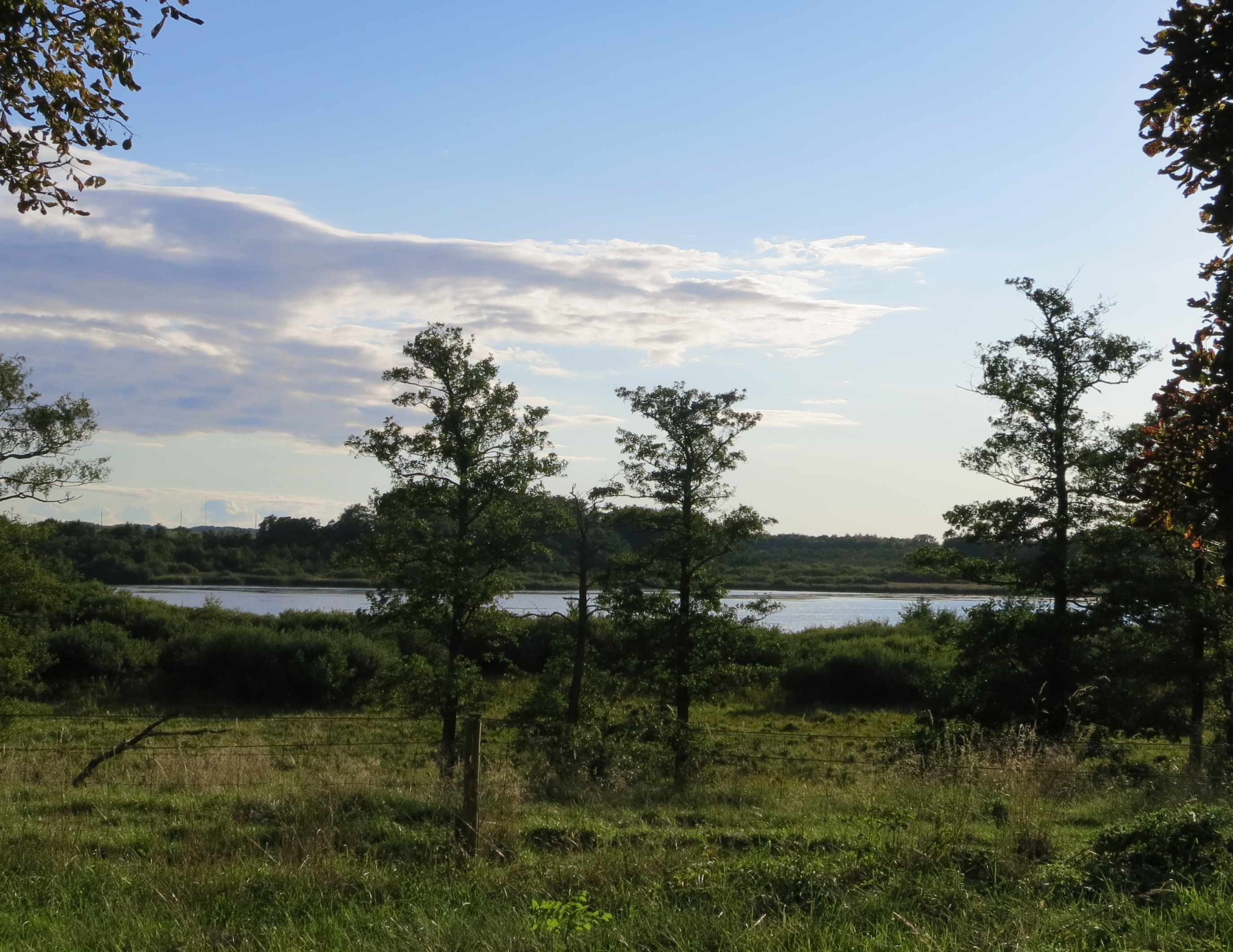 Klosterviken, Börringekloster, Skåne